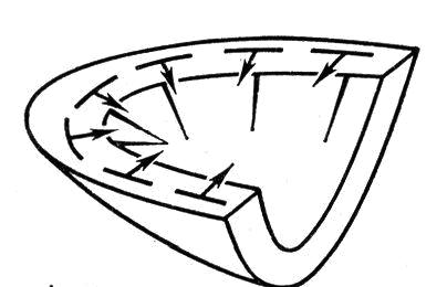 Схема